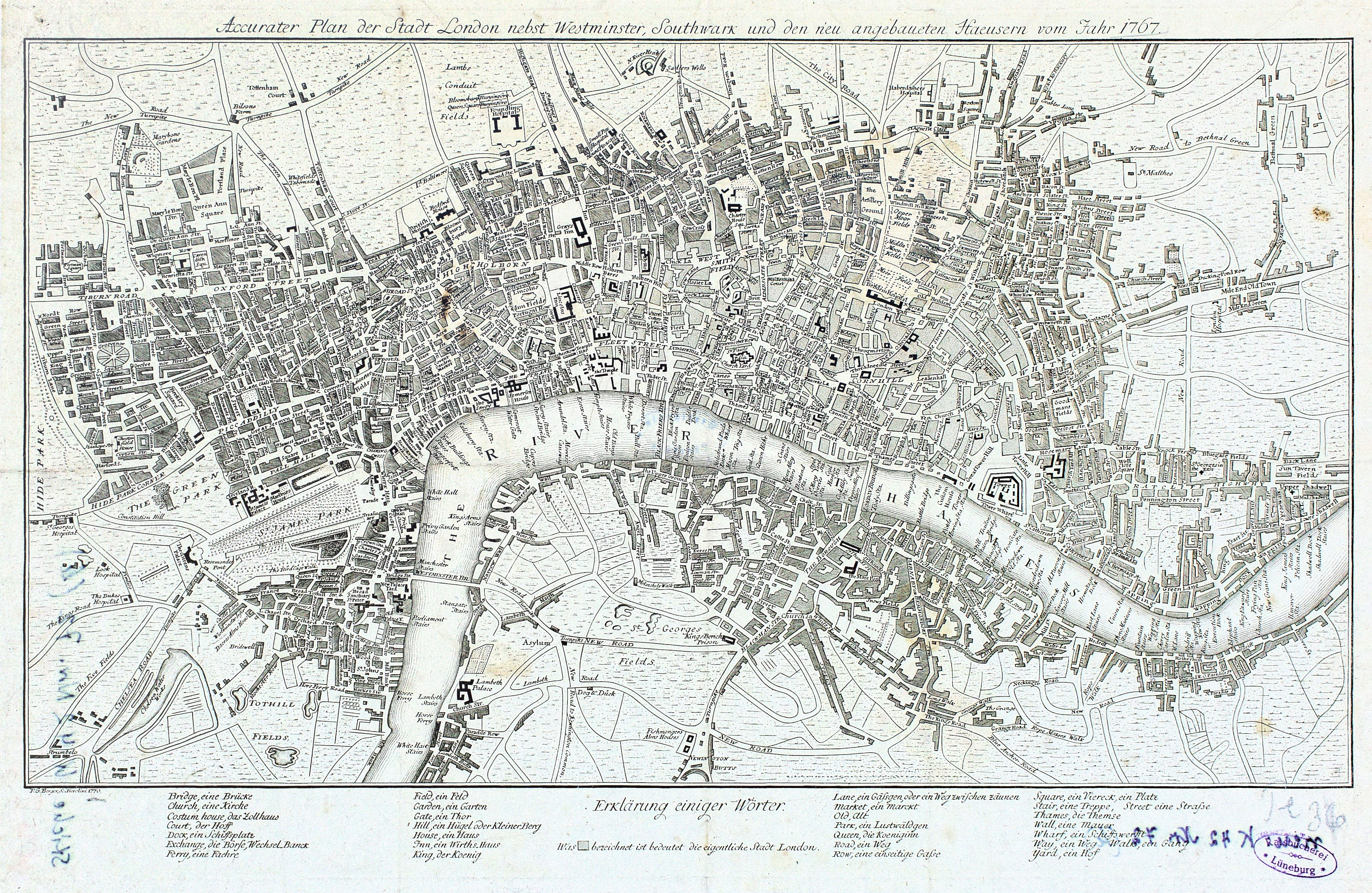 Die Bilder enstanden anläßlich eines Workshops im Rahmen von Skillshare 2010 in Zusammenarbeit mit dem Stadtarchiv Lüneburg. Die Originale wurden freundlicherweise vom Stadtarchiv zur Verfügung gestellt. . Plan der Stadt London nebst Westmister Southpark und den neuaufgebauten Häuser von 1767 Registratur: Stich K 42 nr 72